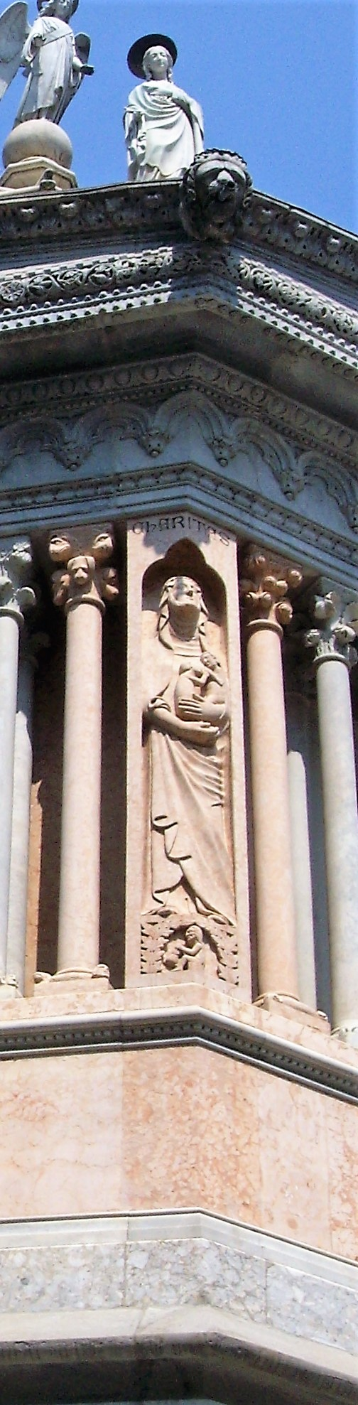 Particolare esterno del battistero di Bergamo opera di Givoanni da Campione